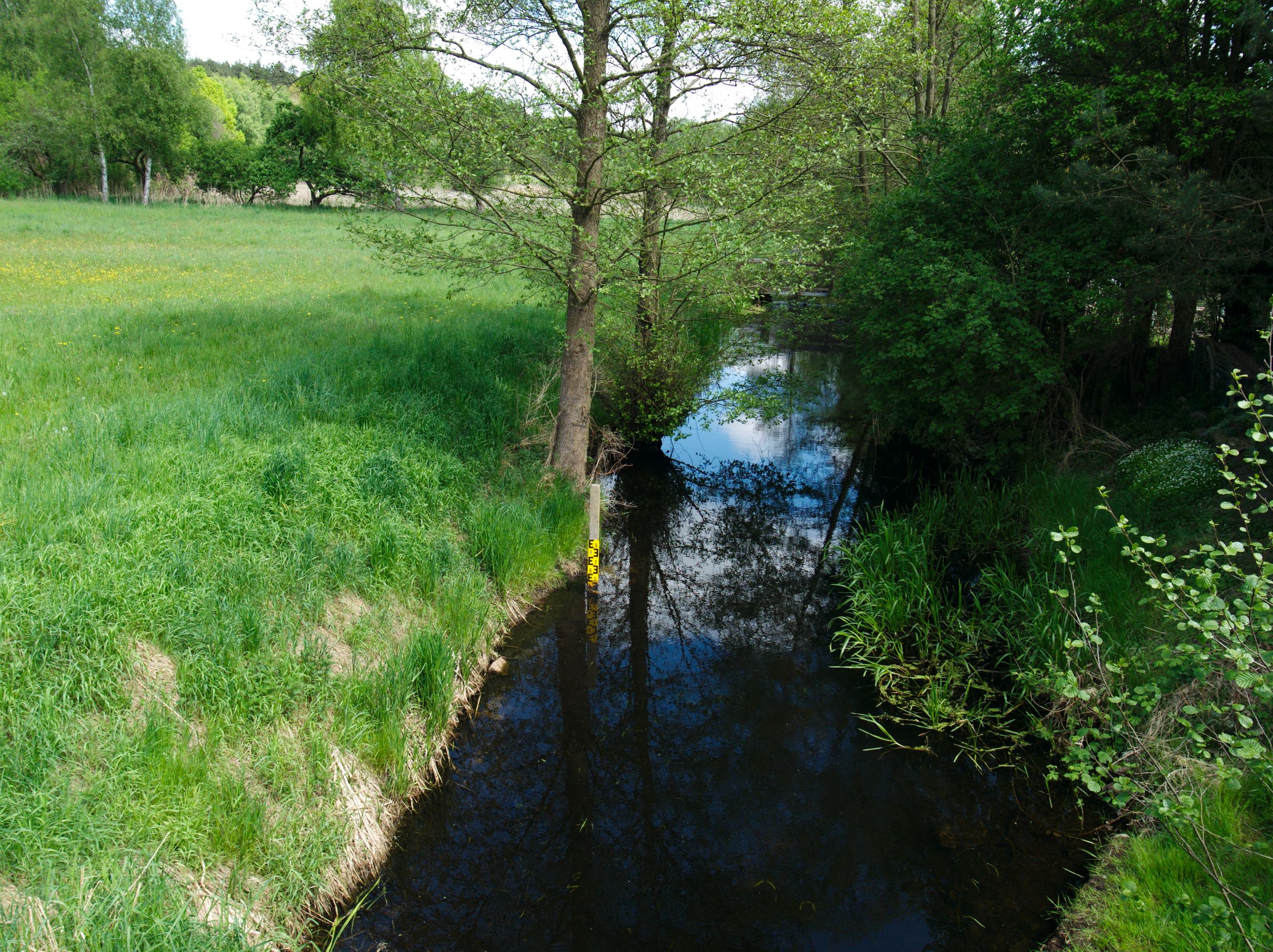 Nausdorfer Kanal von der Brücke bei Nausdorf im Landkreis Prignitz, Deutschland; Blick gen Nordosten